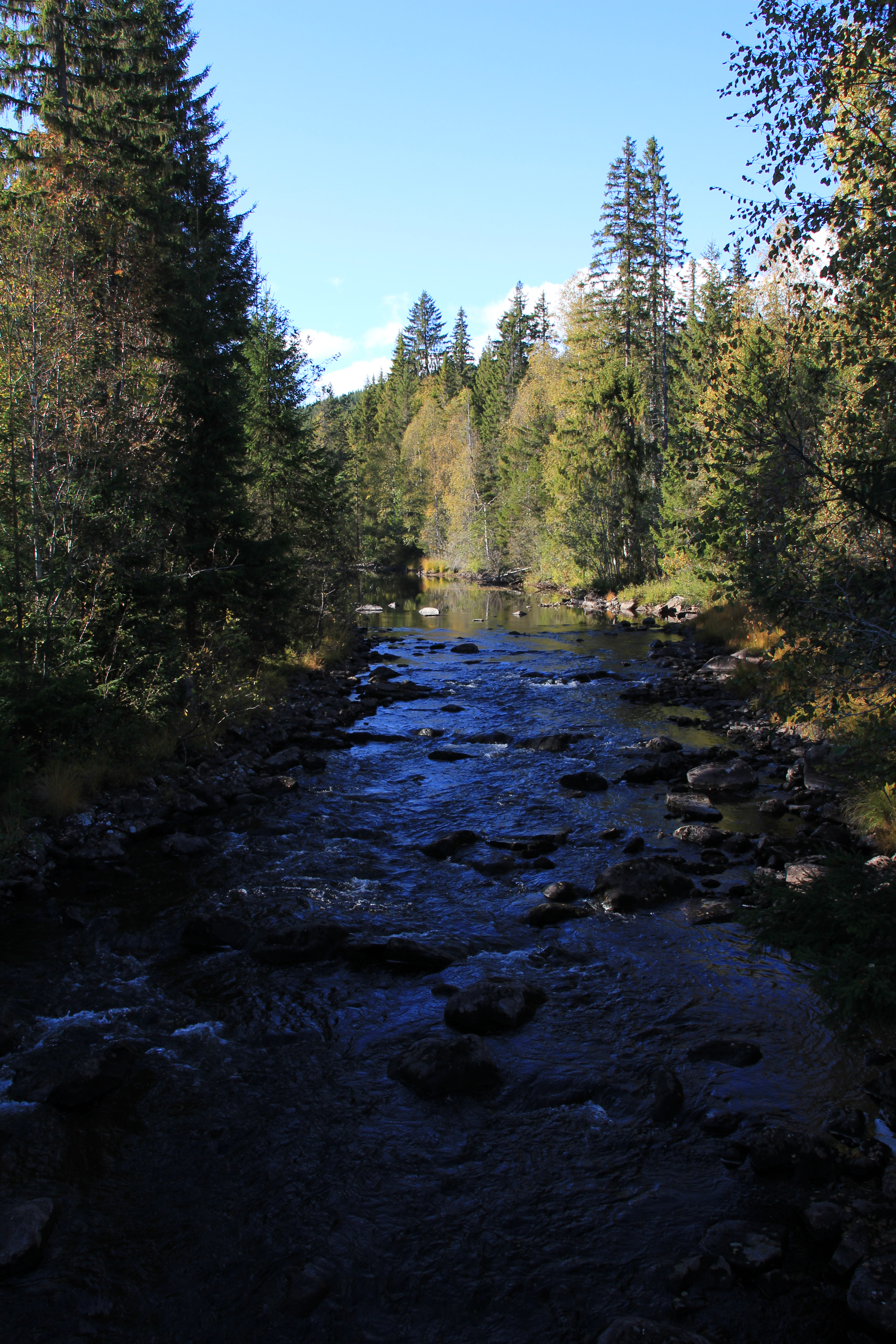 Gjødingelva renner ut fra Skrukkelisjøen og munner ut i Hurdalssjøen i Akershus.